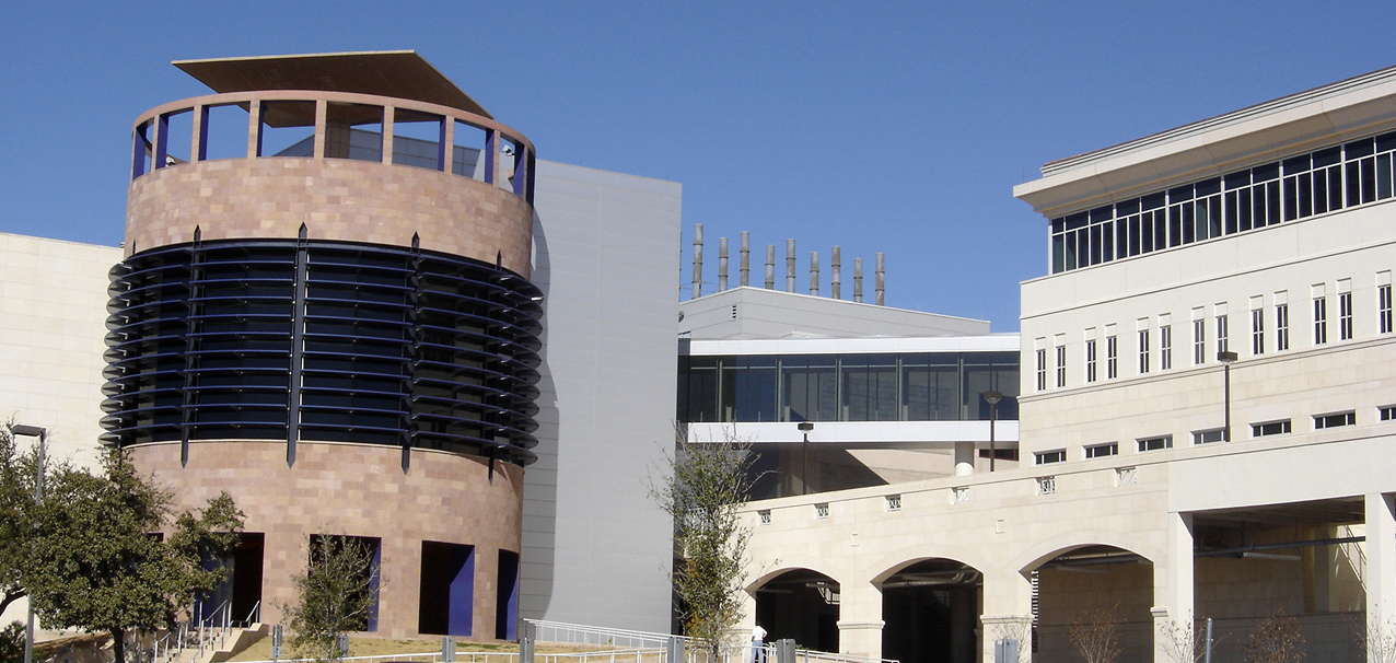 UTSA